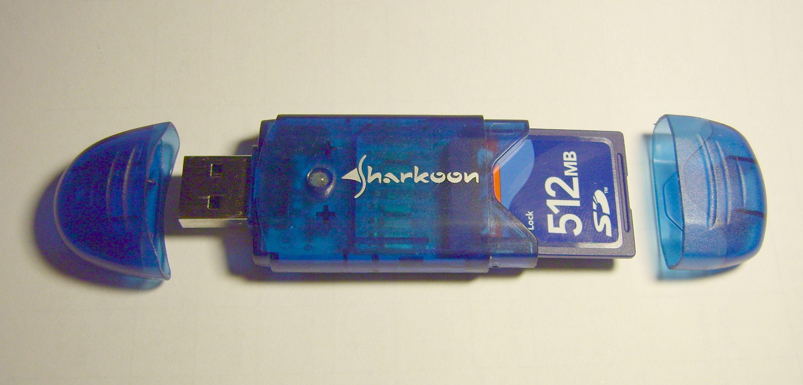 Secure digital card usb-adapter